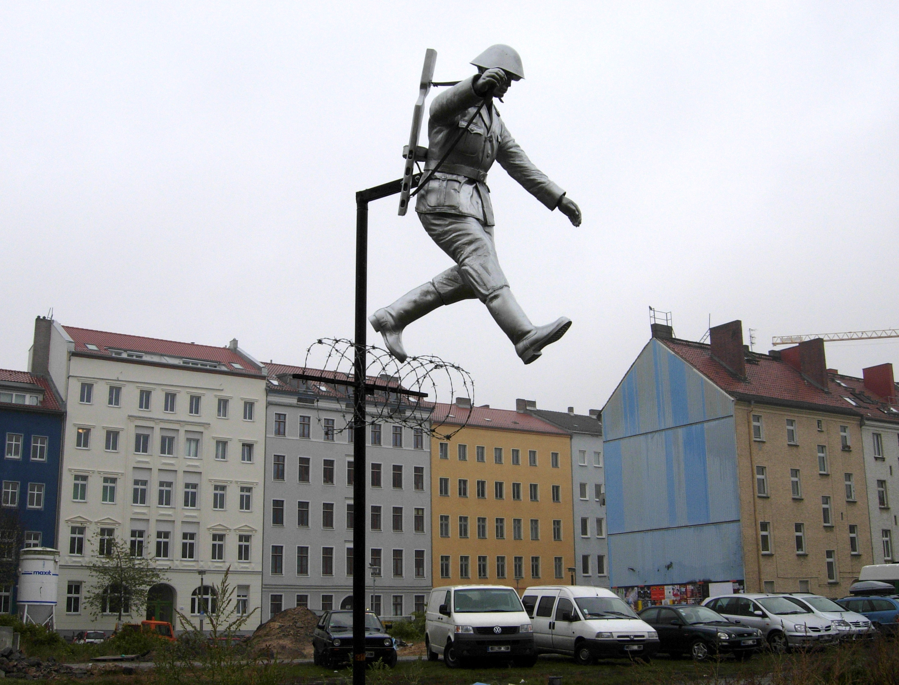 Skulptur auf dem Mauerstreifen an der Bernauer Straße (Nähe Ruppiner Straße) in Berlin-Mitte; sie erinnert an den NVA-Soldaten Conrad Schumann, der am 15. August 1961 (zwei Tage nach der Grenzabriegelung) aus der südlichen Ruppiner Straße über einen Stacheldrahtverhau in die Bernauer Straße sprang (vom sowjetischen Sektor in den französischen); die Häuser im Hintergrund zieren die Titelseite des Berlin-Romans Mauerstreifen (Jesinghaus, Verlag Universal Frame)